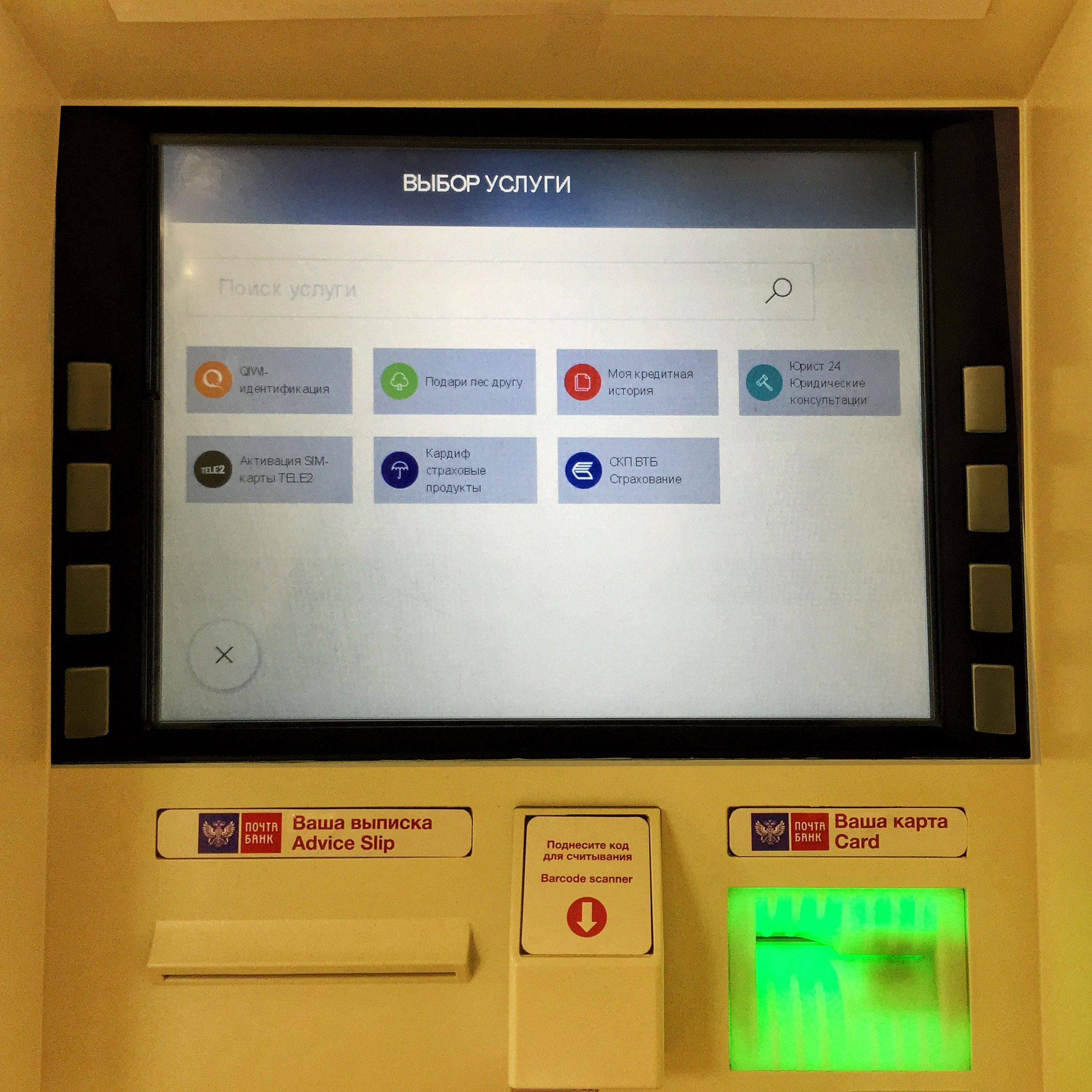 Экран банкомата Почта Банка